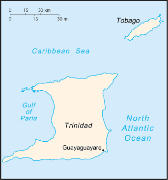 Guayaguayare